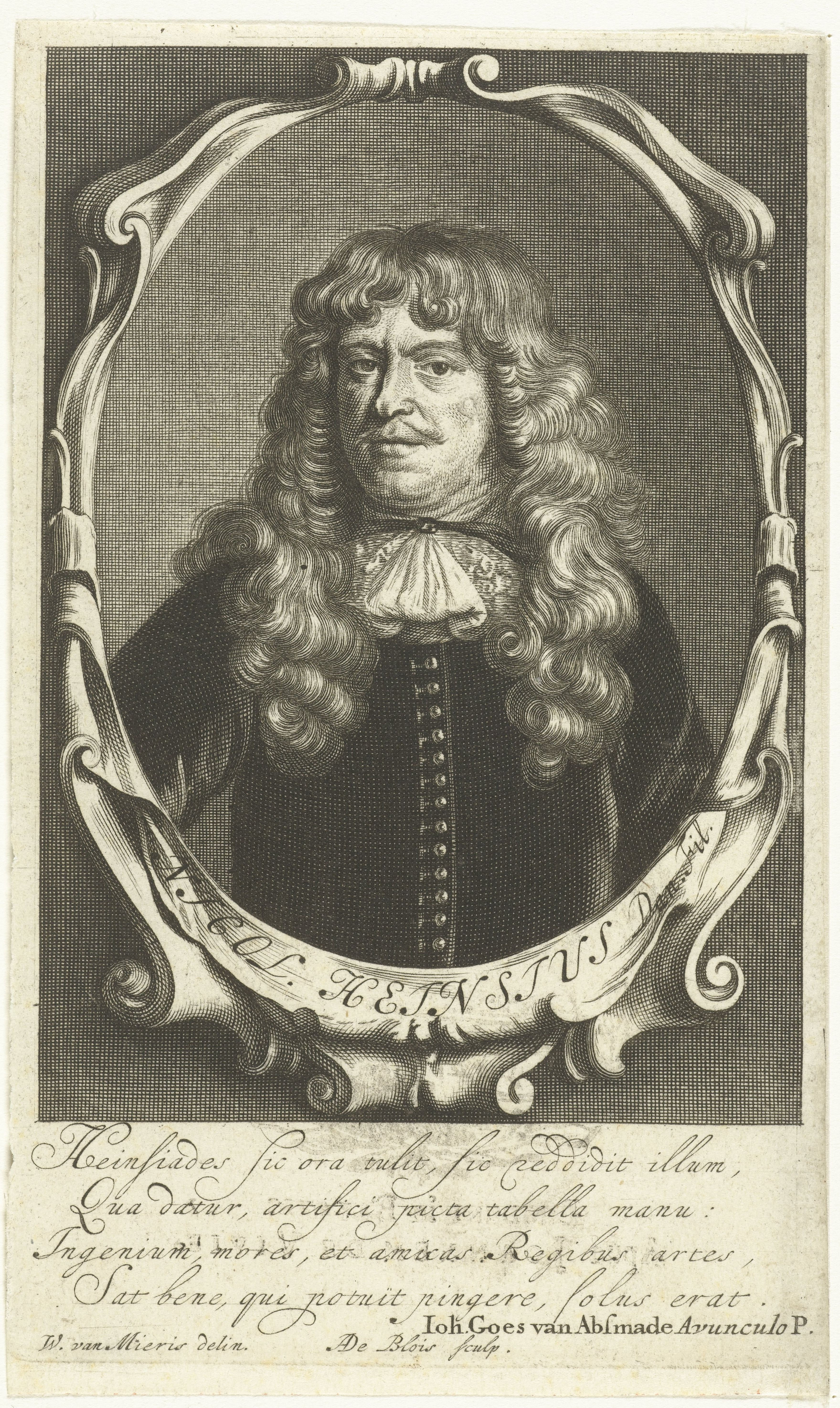 IdentificatieTitel(s): Portret van Nicolaas HeinsiusNicol. Heinsius Dan. Fil (titel op object)Objecttype: prent Objectnummer: RP-P-OB-26.668Catalogusreferentie: Wurzbach 8Opschriften / Merken: verzamelaarsmerk, verso rechts, gestempeld: Lugt 2228Omschrijving: Portret van classicus en dichter Nicolaas Heinsius, buste in ovale omlijsting met krulornamenten. Onder het portret staat een vers Waar: in hij geroemd wordt.VervaardigingVervaardiger: prentmaker: Abraham de Blois (vermeld op object)naar tekening van: Willem van Mieris (vermeld op object)schrijver: Joh. Goes van Absmade (vermeld op object)Plaats vervaardiging: AmsterdamDatering: 1679 - 1717Fysieke kenmerken: gravureMateriaal: papier Techniek: graveren (drukprocedé)Afmetingen: blad: h 149 mm × b 90 mmToelichtingPrent naar tekening van Willem van Mieris.OnderwerpWie: Nicolaas HeinsiusVerwerving en rechtenVerwerving: onbekendCopyright: Publiek domein